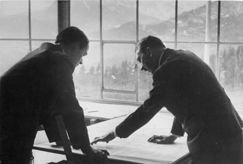 Obersalzberg, Albert Speer, Adolf Hitler Alle großen Bauprojekte arbeitet Adolf Hitler selbst durch! In gewaltigen Bauten schuf er einen sichtbaren Ausdruck für die Größe der Zeit und gab damit dem deutschen Volk einen wahrhaft großen und edlen Baustil. 1938 [Obersalzberg.- Adolf Hitler und Albert Speer über Plänen im Berghof] Abgebildete Personen: Hitler, Adolf: Reichskanzler, Deutschland Speer, Albert Prof. Dr.: Reichsminister für Rüstung und Kriegsproduktion, Architekt, Deutschland (GND 118615998)